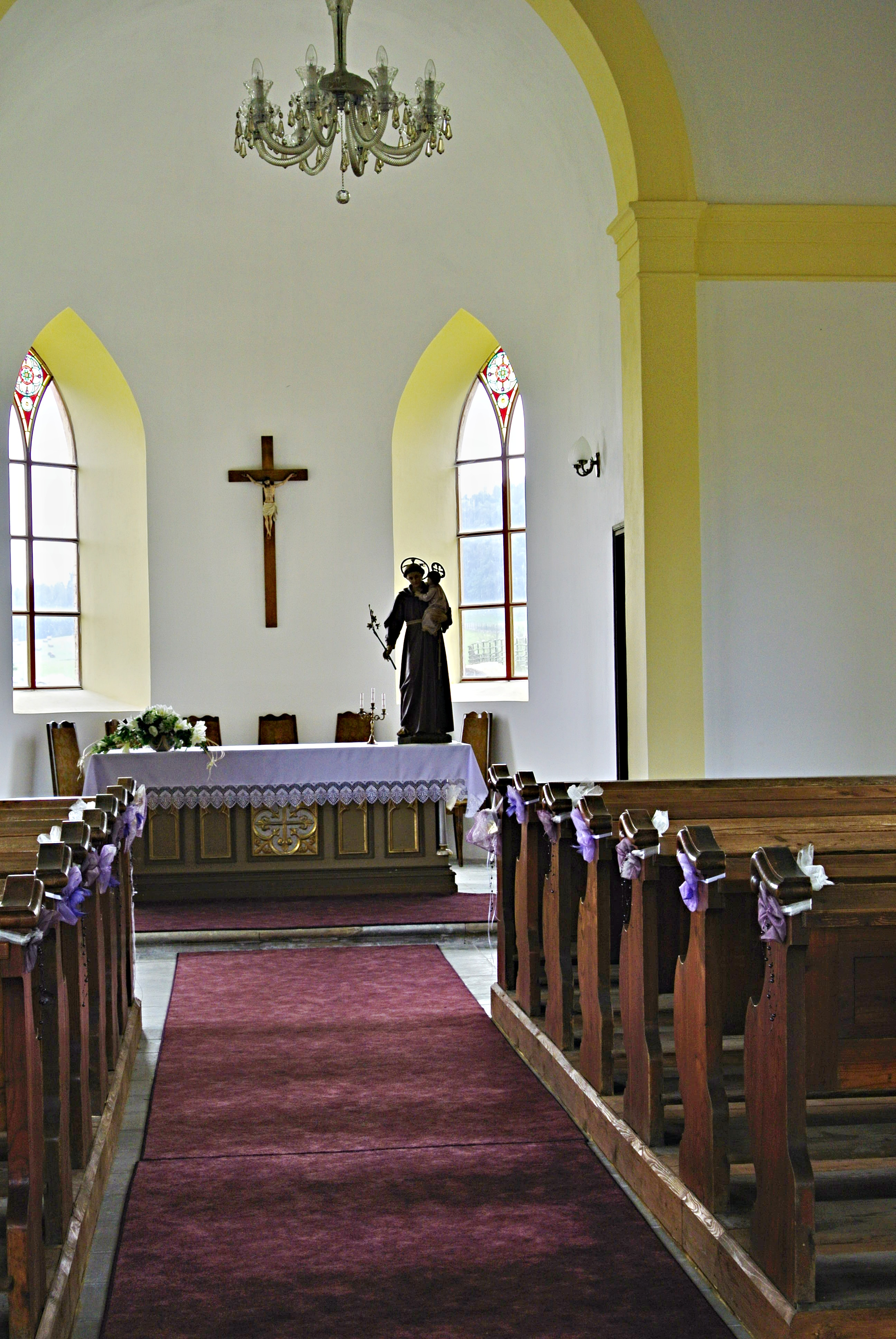 Kaple svatého Antonína, střed vsi, Heřmanice v Podještědí.